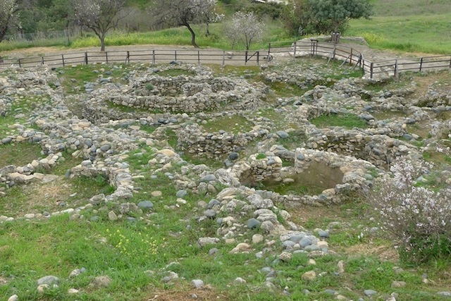 Ausgrabung der jungsteinzeitlichen Siedlung bei Chirokitia, Zypern.